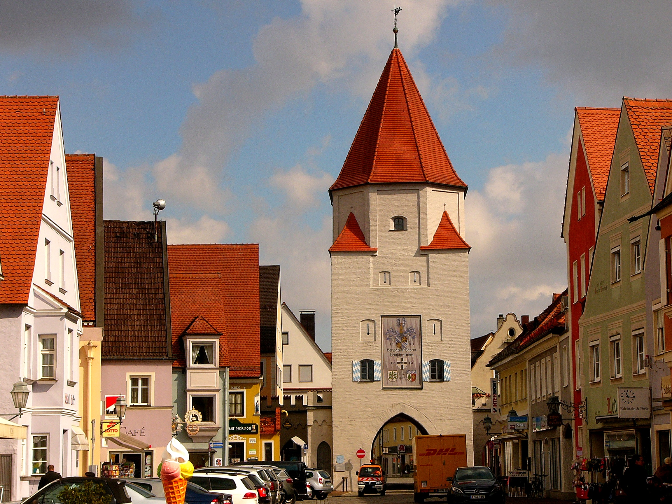 Unteres Tor; Untergeschosse 1418, Oktogon mit Spitzhelm 1646, seitliche Durchgänge 1864; siehe Eintrag Stadtbefestigung.This is a photograph of an architectural monument.